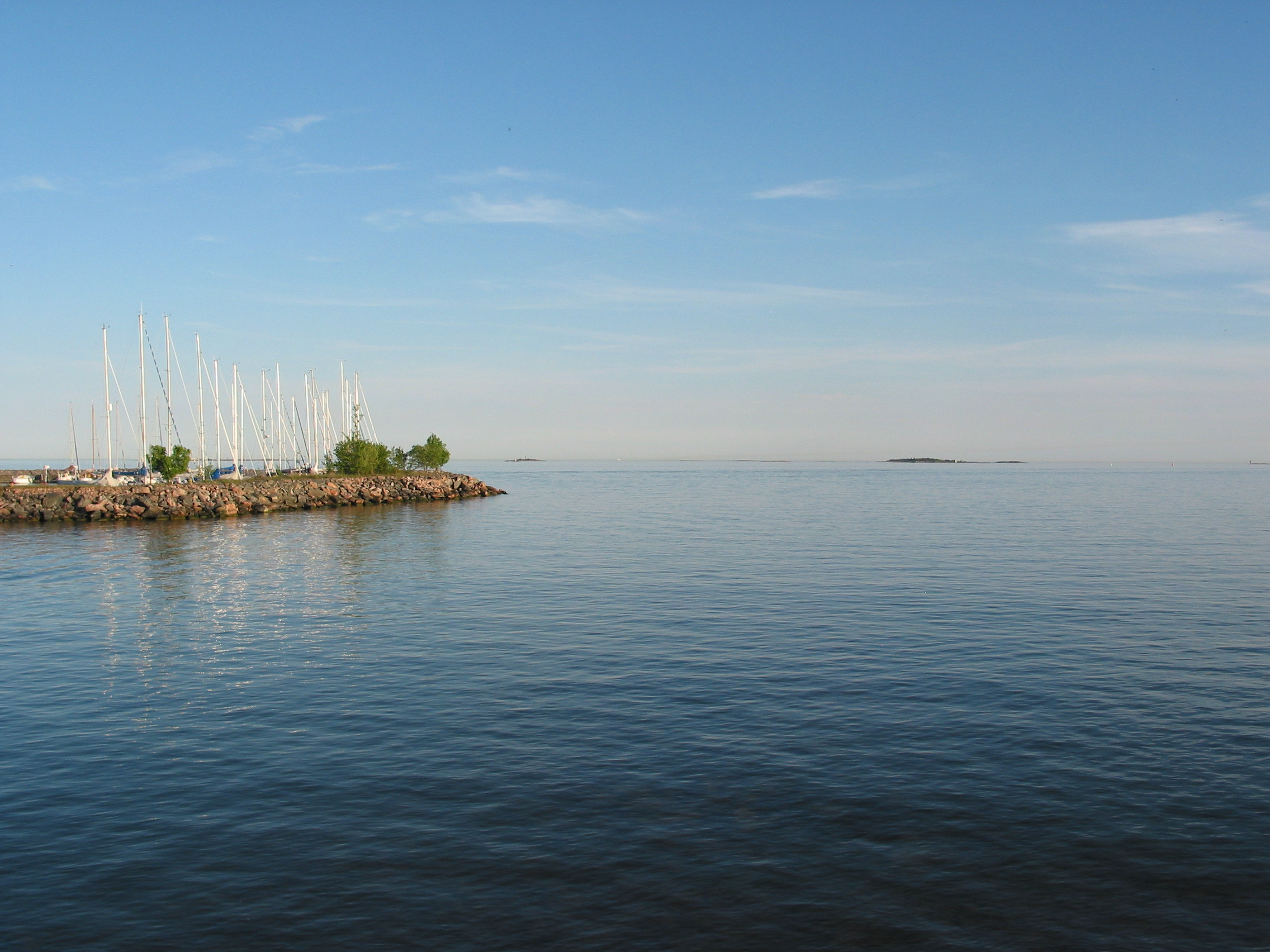 Eira, Helsinki, Finland